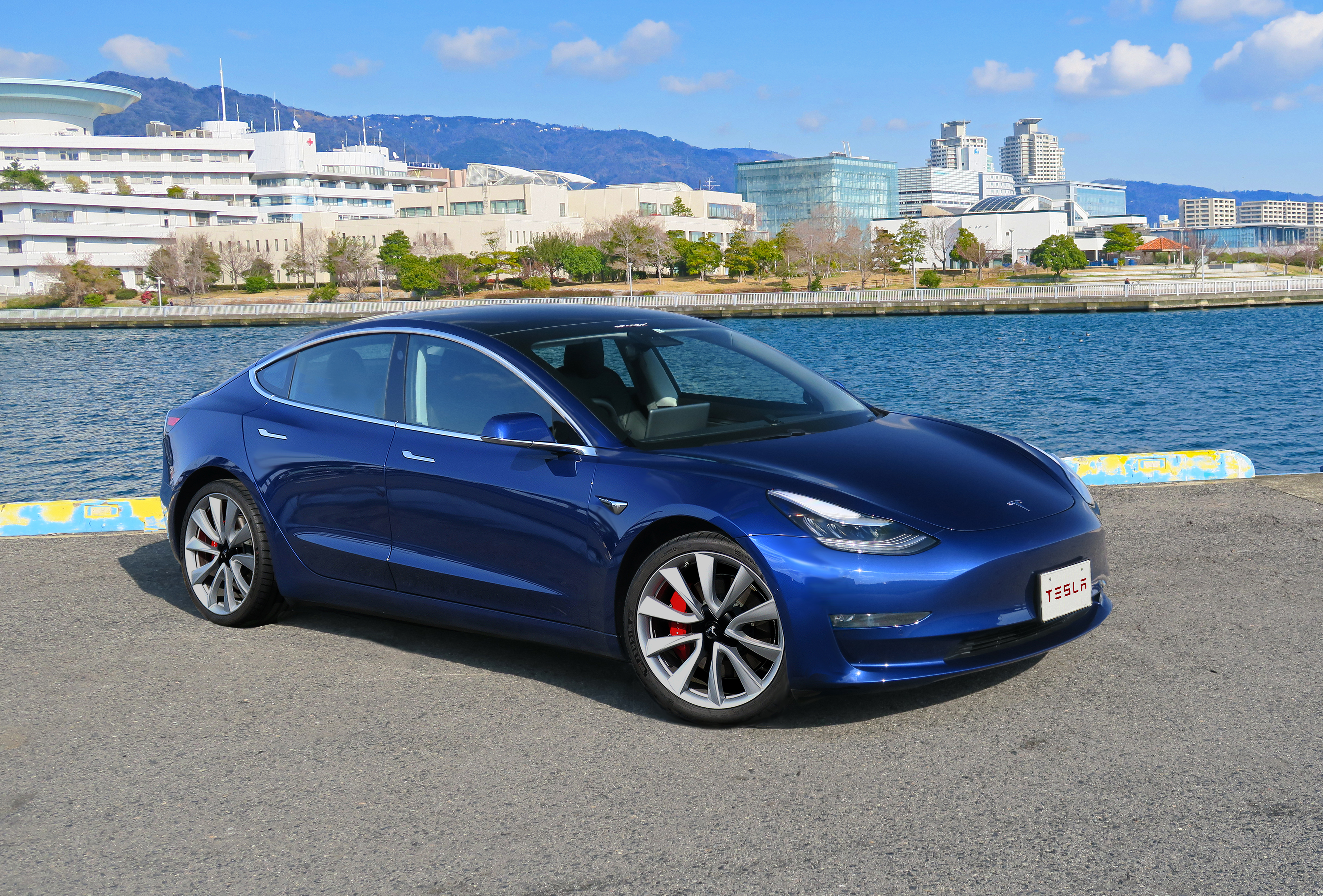 Tesla Model3